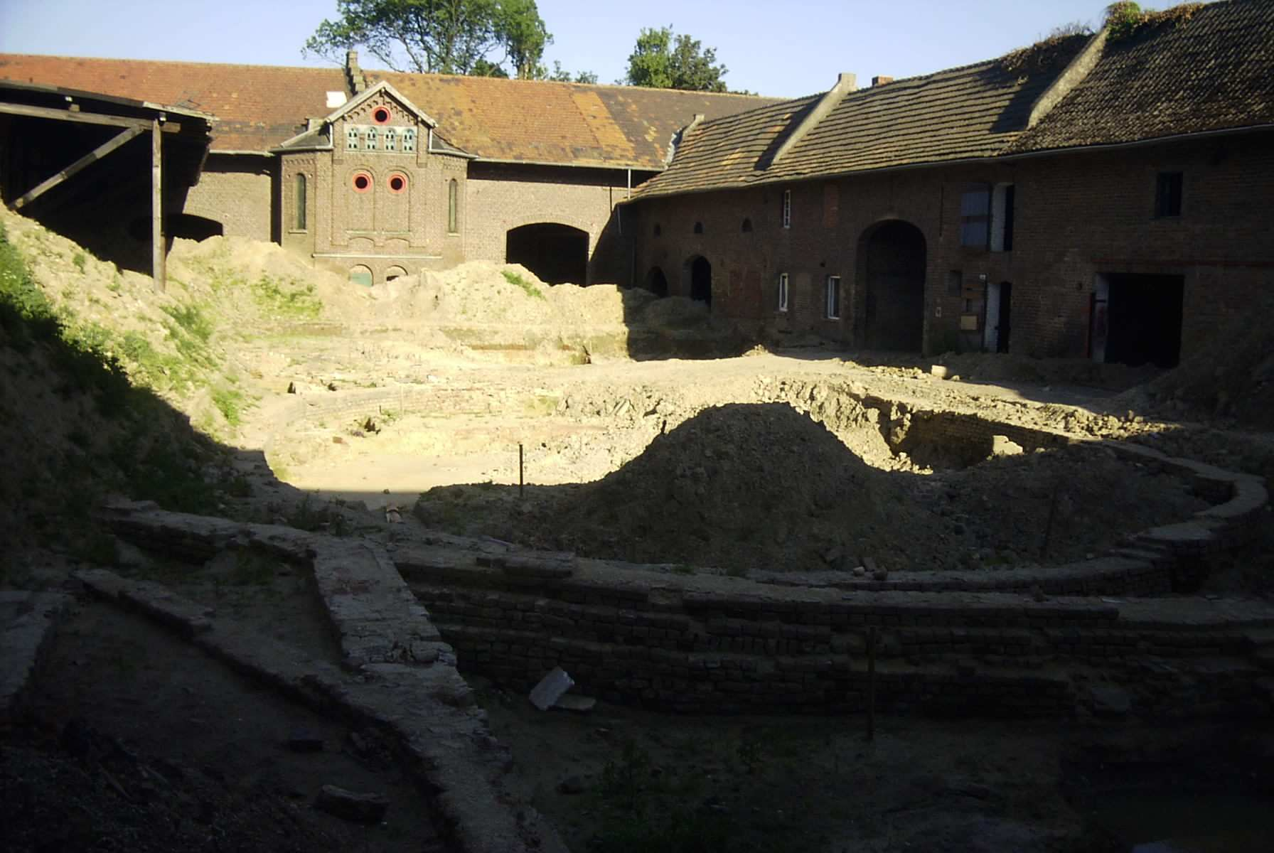 Rittergut Leuffen, Otzenrath bei Jüchen, Ausgrabungen im Hofbereich